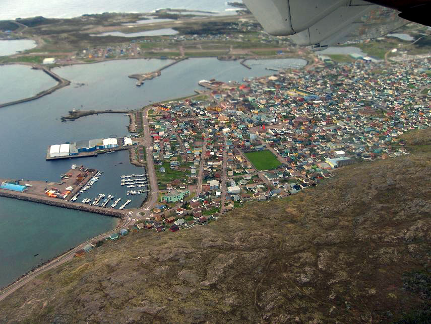 Photo aérienne de la ville de Saint-Pierre sur l'île de Saint-Pierre et Miquelon.